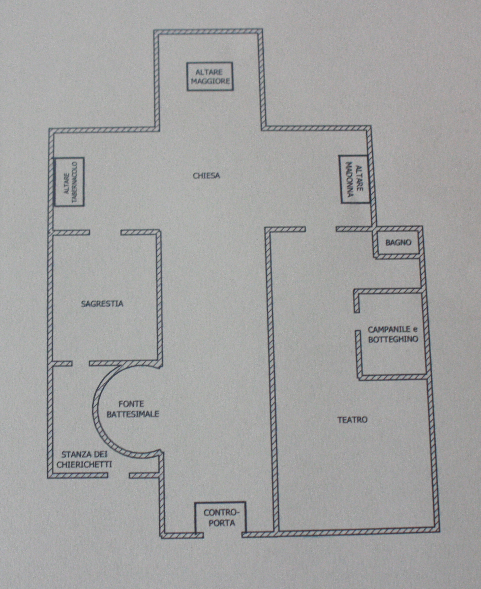 Pianta della chiesa moderna di San Quirico a Legnaia, nella quale sono evidenziate le varie aree dell'edificio